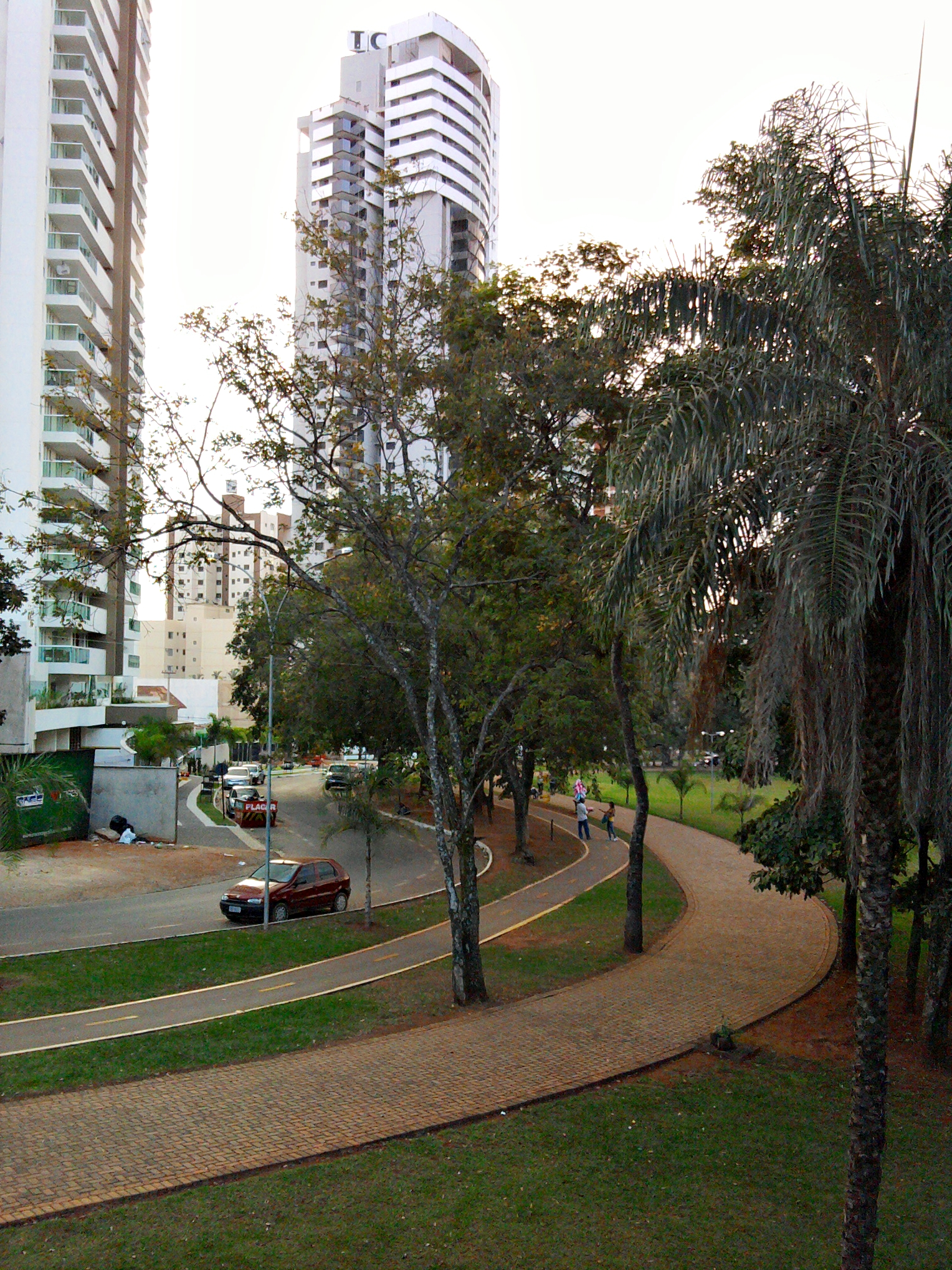 Típica Rua do Jardim Goiás - Goiânia - Goiás - Brasil